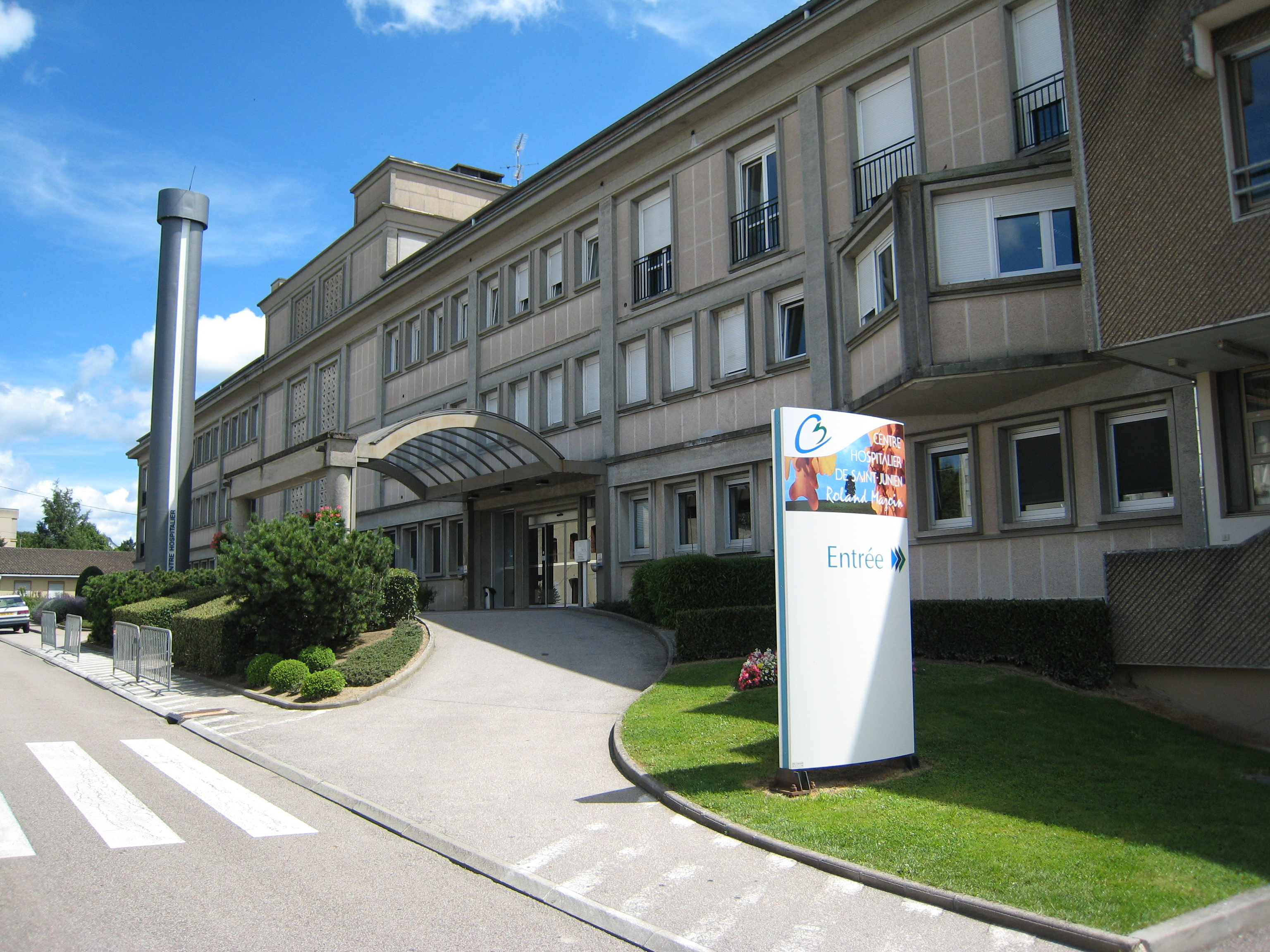 Centre hospitalier de Saint-Junien, Haute-Vienne (87), France